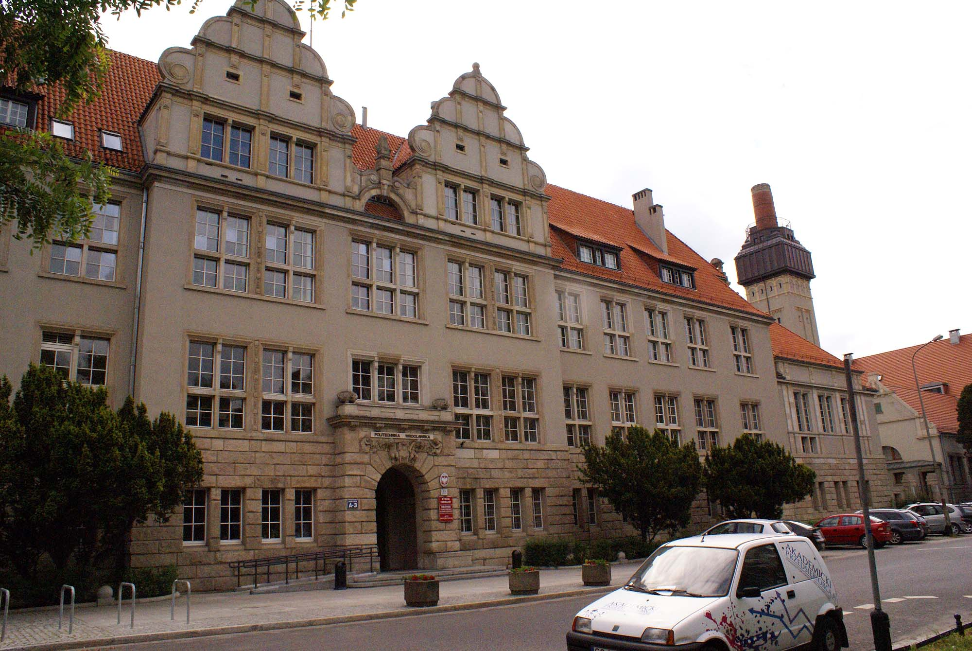 Wrocław, zespół Politechniki Wrocławskiej, 1905-1911, 1935